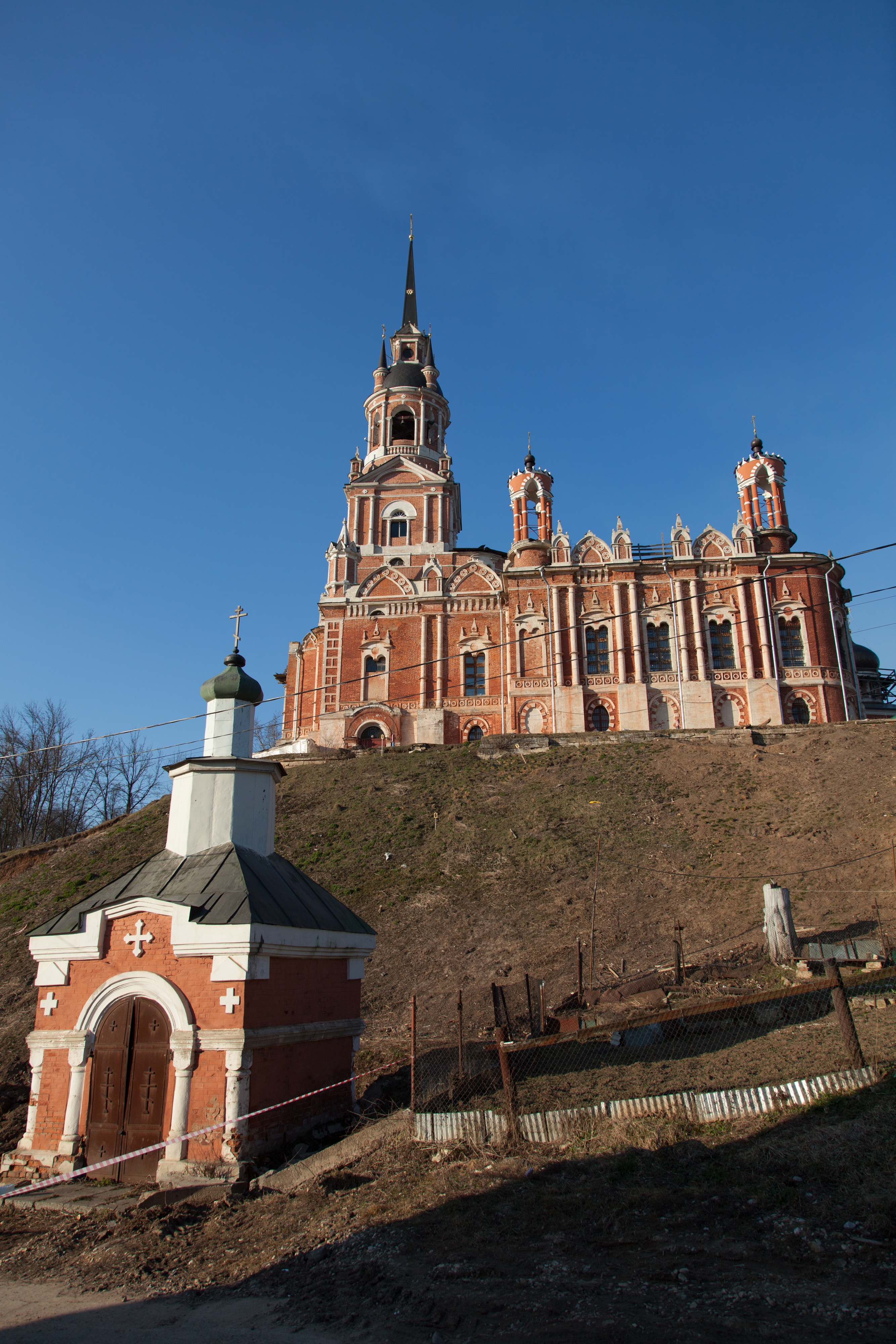 Часовня (Москва и Московская область, Можайск, улица Бородинская, 8 у основания холма)